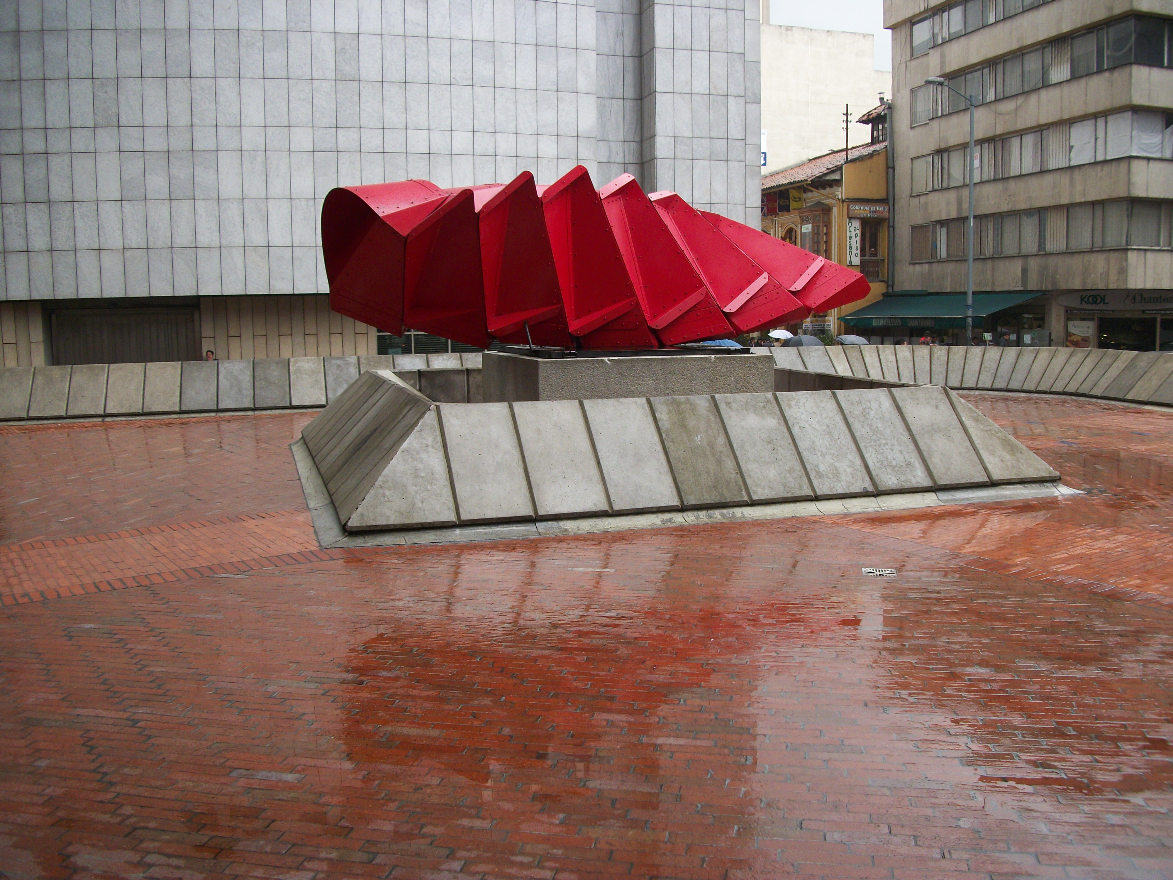 Dinamismo, monumento conmemorativo de édgar Negret, cra 5 con clle 15. Edificio Procuraduría General de la Nación. Bogotá.